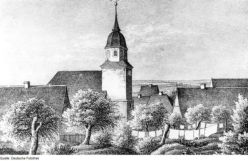 Original image description from the Deutsche FotothekNossen-Heynitz. Kirche